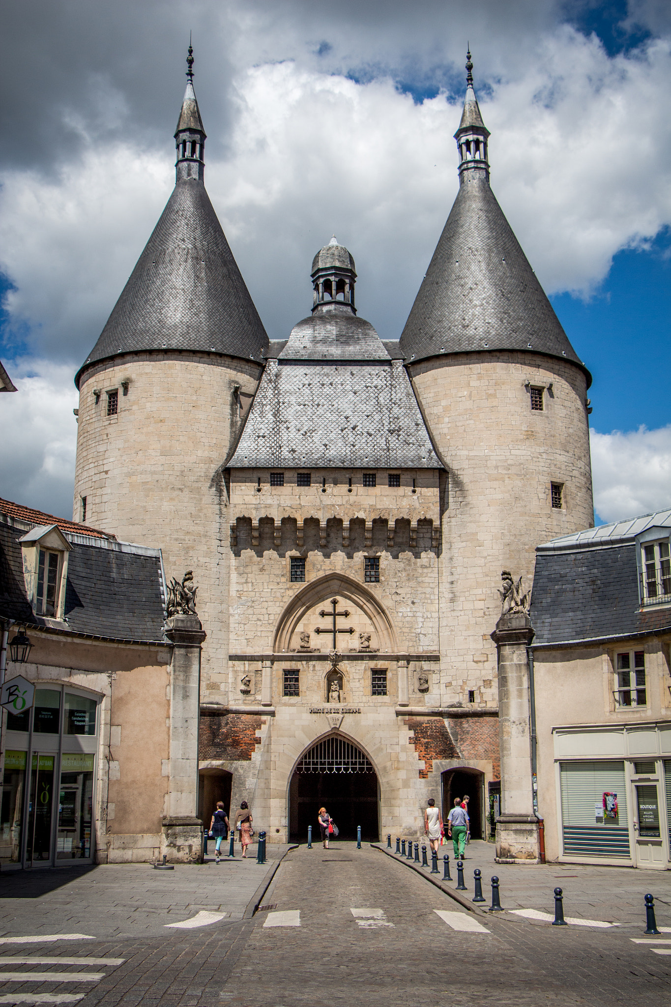 500px provided description: Nancy Porte De La Craffe [#city ,#architecture ,#gate ,#castle ,#ch?teau ,#ville ,#porte ,#France ,#Nancy ,#m?di?vale ,#Porte de la Craffe]